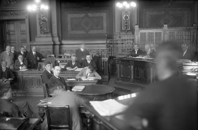 Die Vernehmung Julius Barmats im grossen Schwurgerichtssaal in Moabit fand am 17.4. in öffentlicher Sitzung statt. Die Aufnahme ist unserem Chef-Operateur unter grossen Schwierigkeiten gelungen. Blick vom Richtertisch auf den Angeklagten Julius Barmat x während seiner Vernehmung, im Hintergrund Vertreter der Presse und Zuschauer.